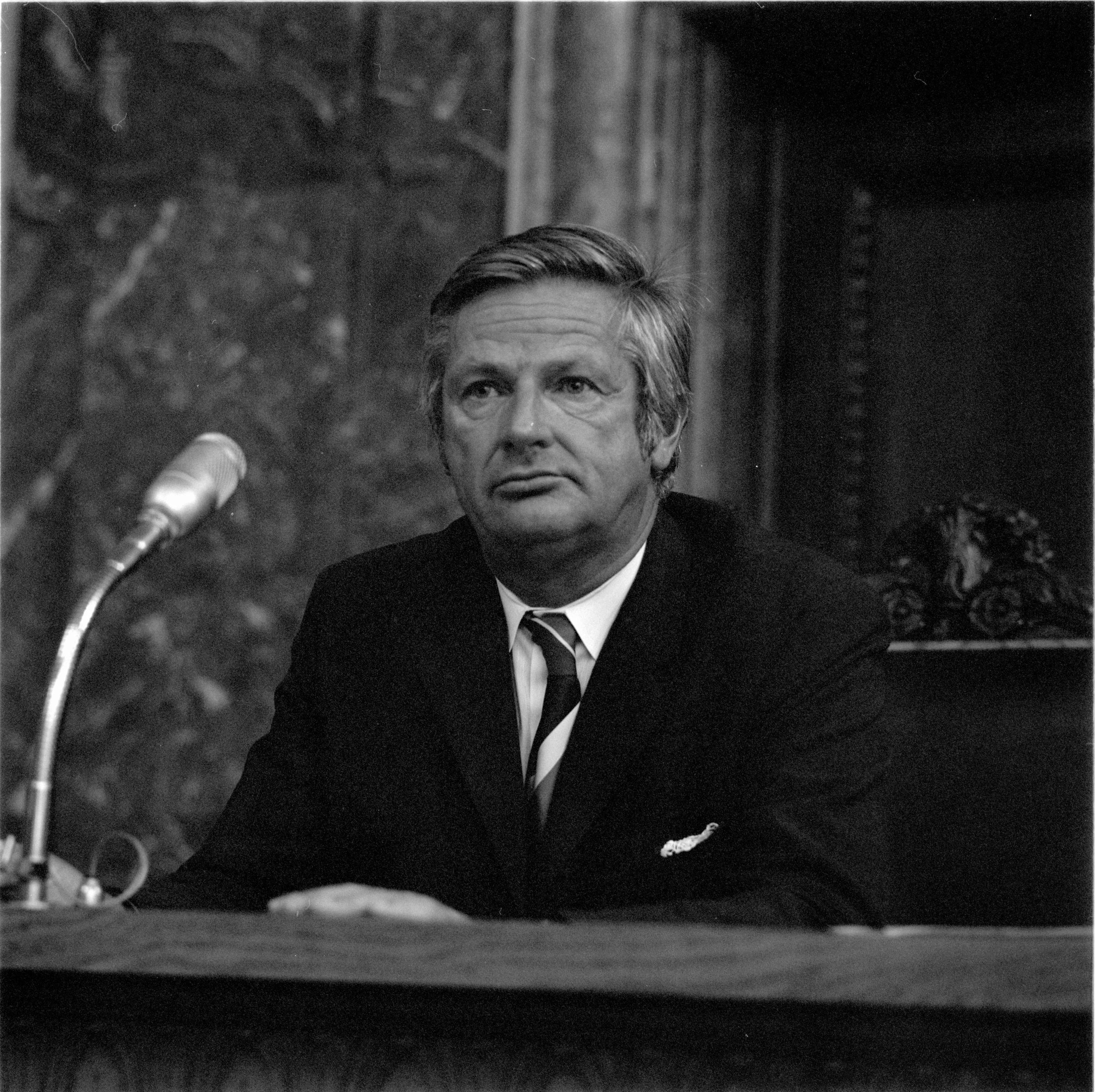 Karl Tizian war von 1950 bis 1970 Bürgermeister der Vorarlberger Landeshauptstadt Bregenz sowie von 1964 bis 1974 Präsident des Vorarlberger Landtags. Hier im Rahmen einer Landtagssitzung am 18. Juli 1974.